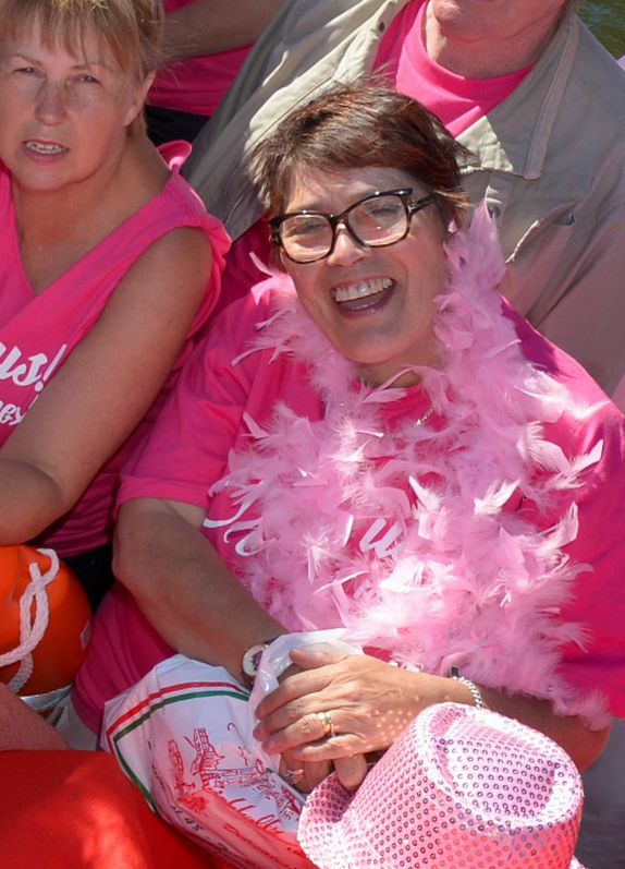 PvdA-boot op de EuroPride 2016 . Fotograaf: Frank van Engelen